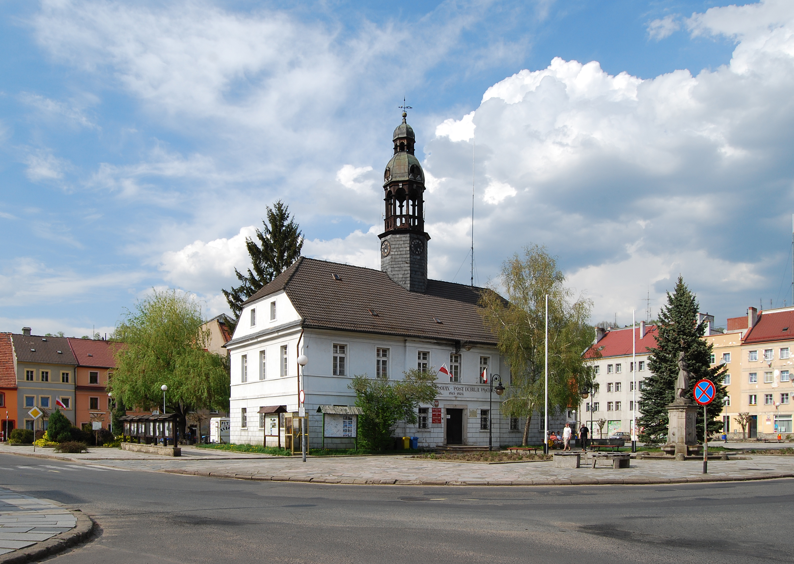 ratusz, XVIII, Wleń